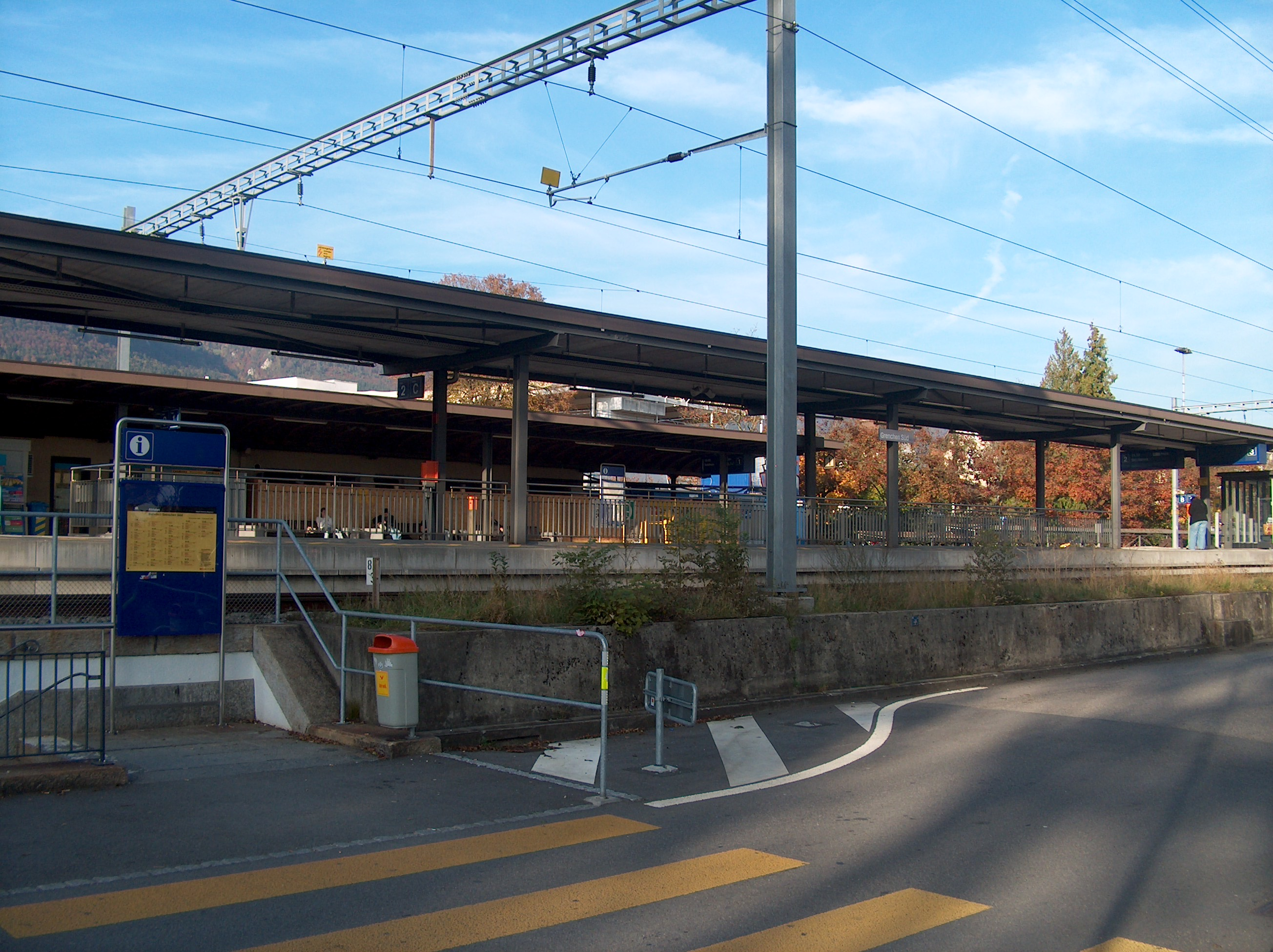 Der Bahnhof-Süd (Grenchen-Süd) liegt auf der Strecke Genf-Romanshorn.